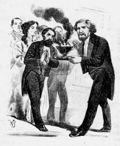 Карикатура на Ивана Тургенева, 1867